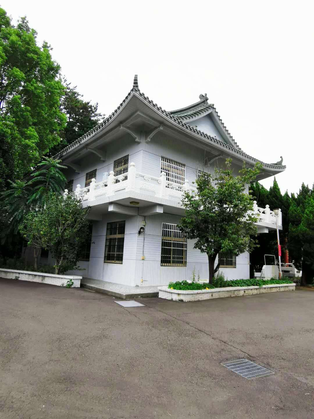 法雲禪寺一隅